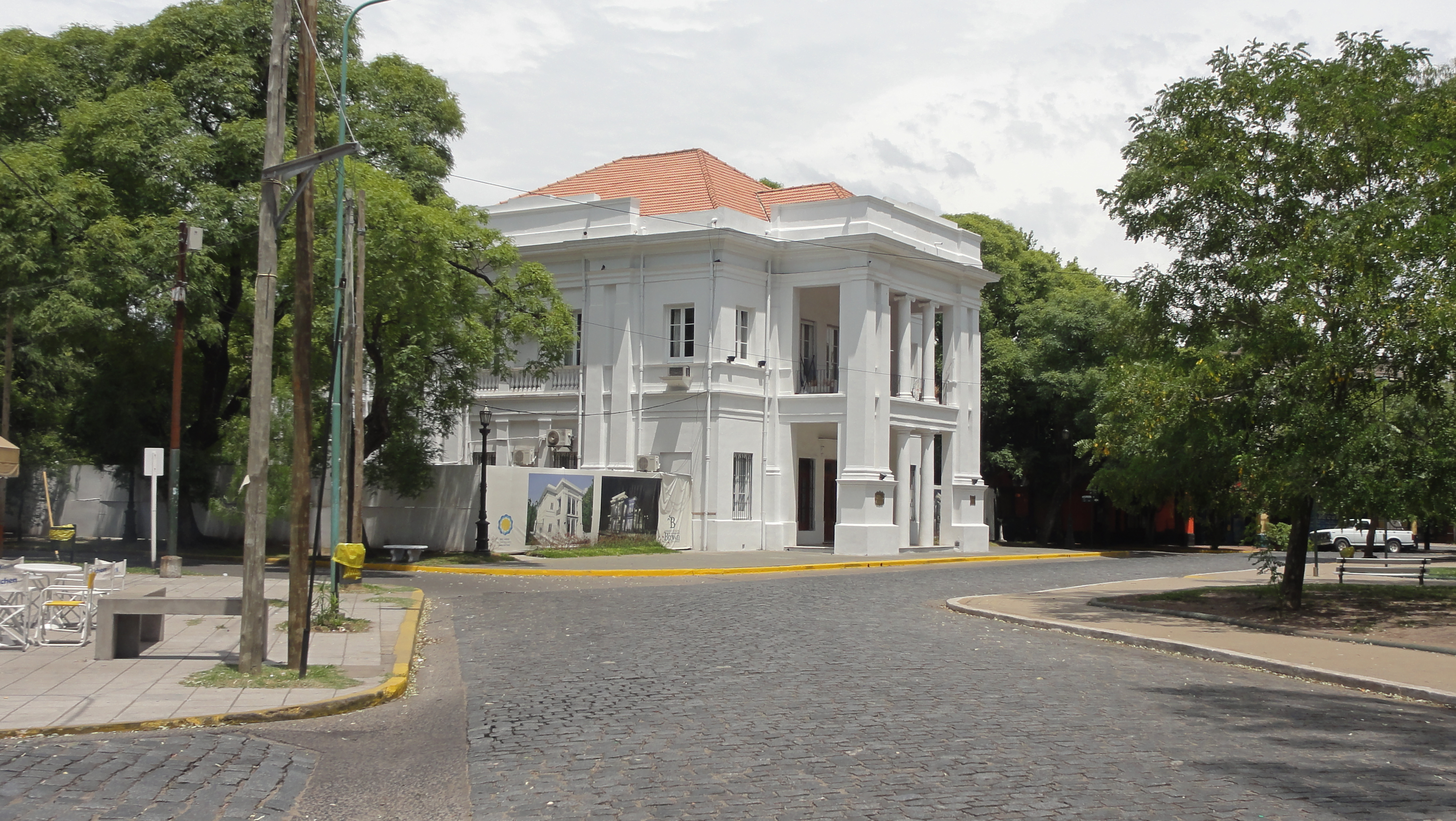 Originario Edificio Municipal